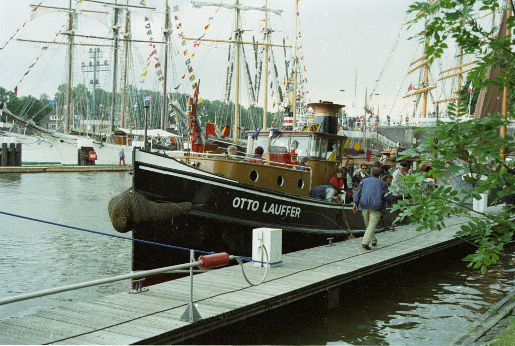 Museumsschiff OTTO LAUFFER in Brunsbüttel.